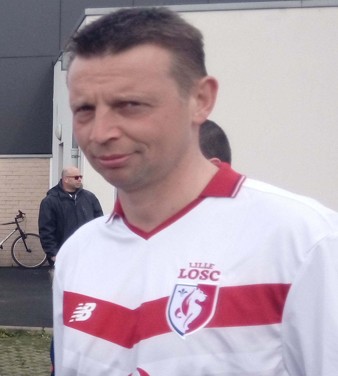 Stéphane Dumont lors d'un match de gala entre les anciens du RC Lens et les anciens du Lille OSC à Libercourt, le 1er avril 2017.